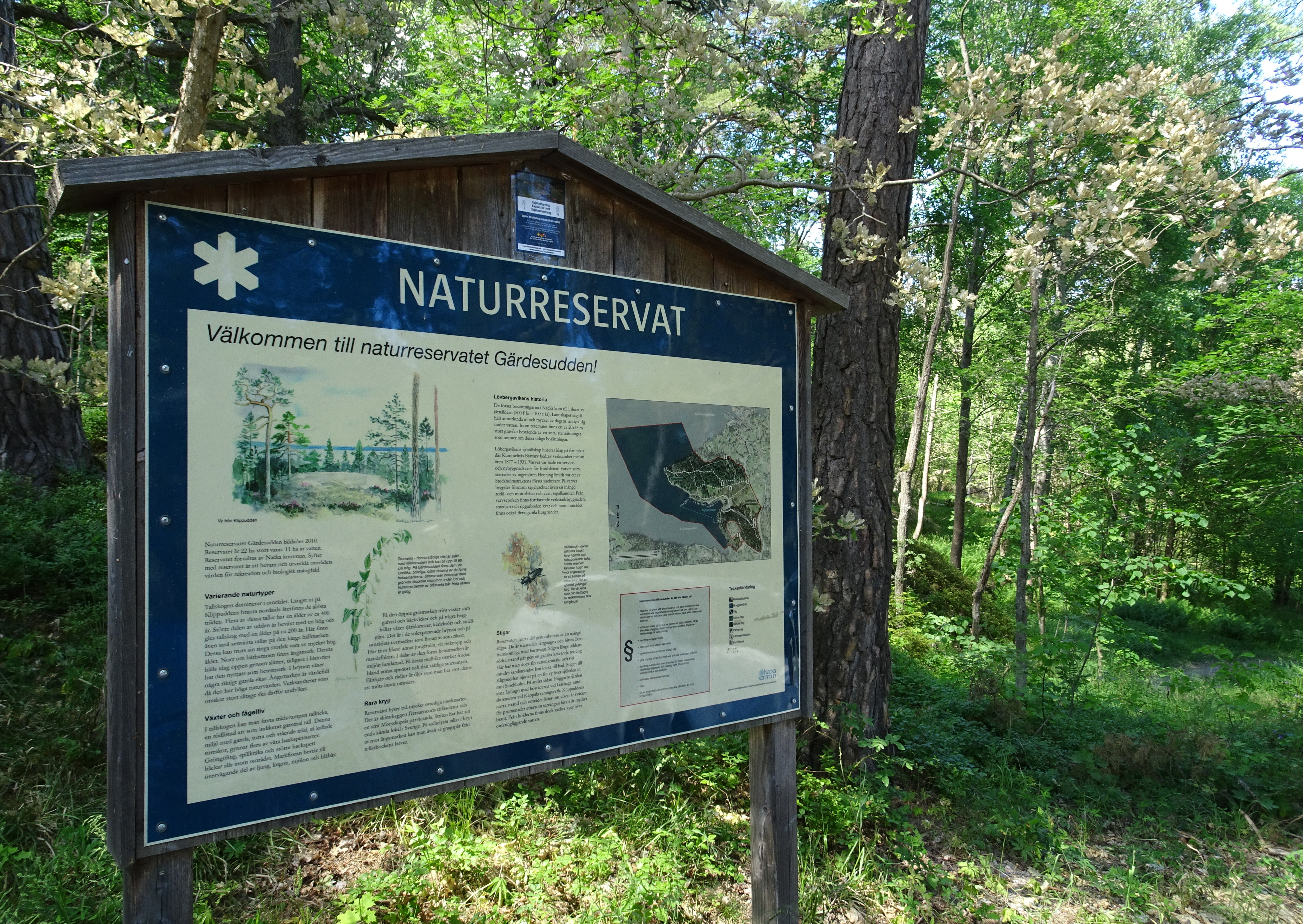 Gärdesuddens Naturreservat, entréskylt